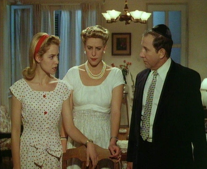 אריה מוסקונה (מימין), דפנה רכטר (באמצע) ומילי אביטל (משמאל), בסרטו של יעקב גולדווסר, "מעבר לים ", 1991